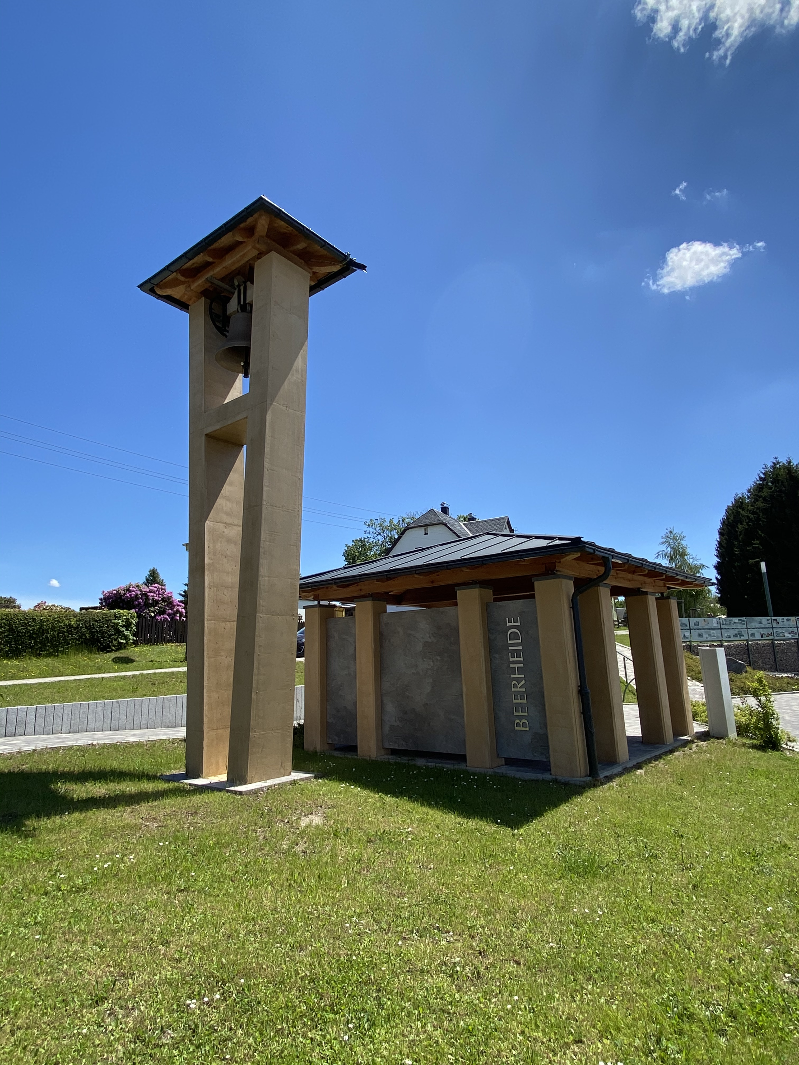 Ortszentrum Beerheide (2020)